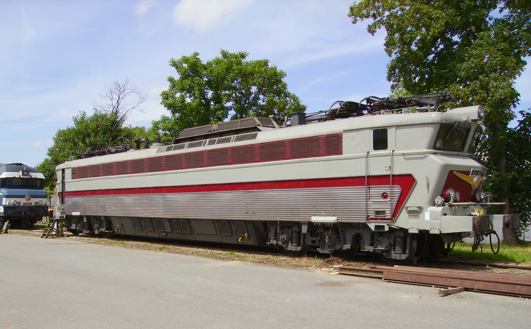 La CC 40110 aux Journées Portes Ouvertes du 5ème Régiment du Génie de Versailles le 14 juin 2009.